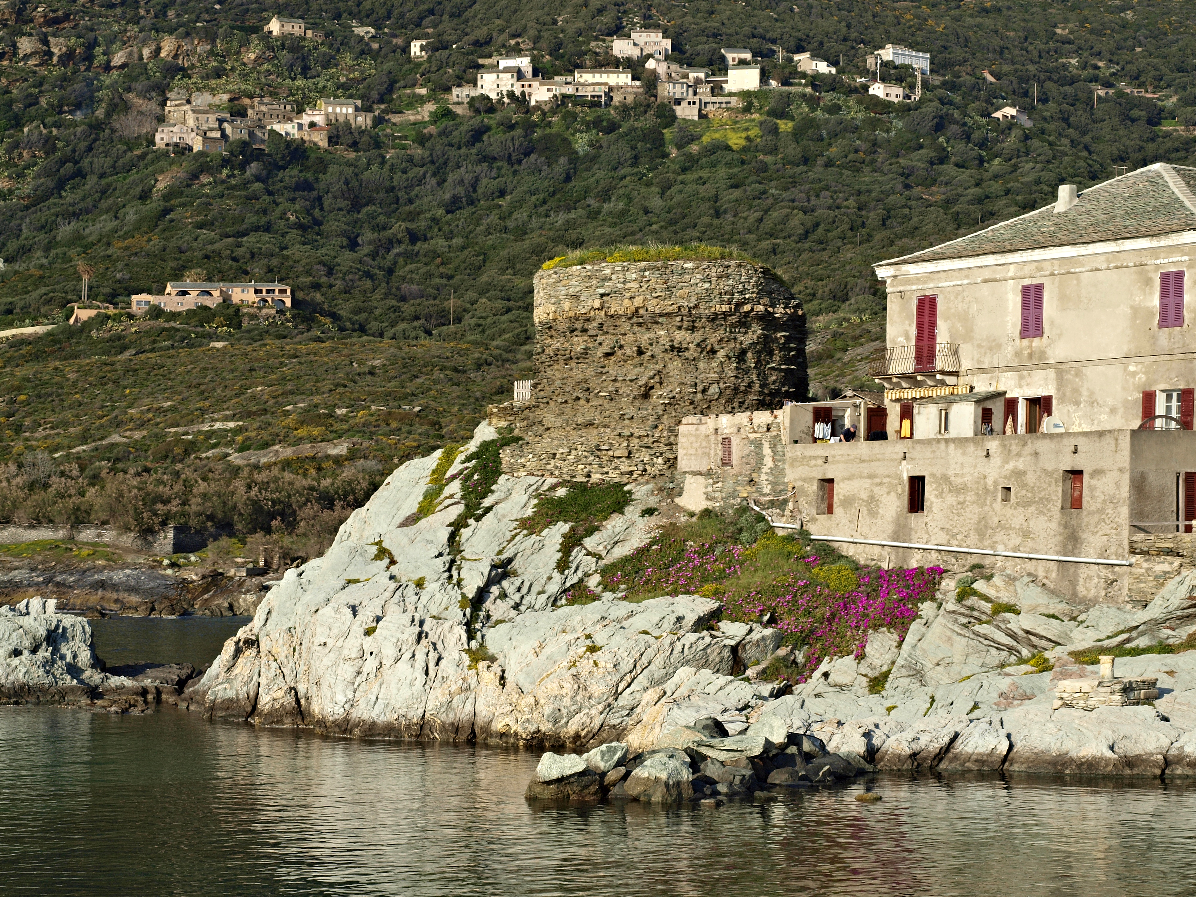 Centuri (Corsica) - Tour génoise du port